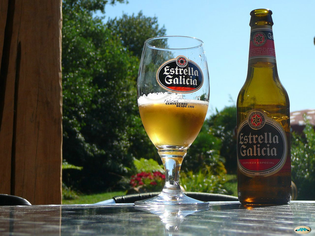 Estrella a contraluz